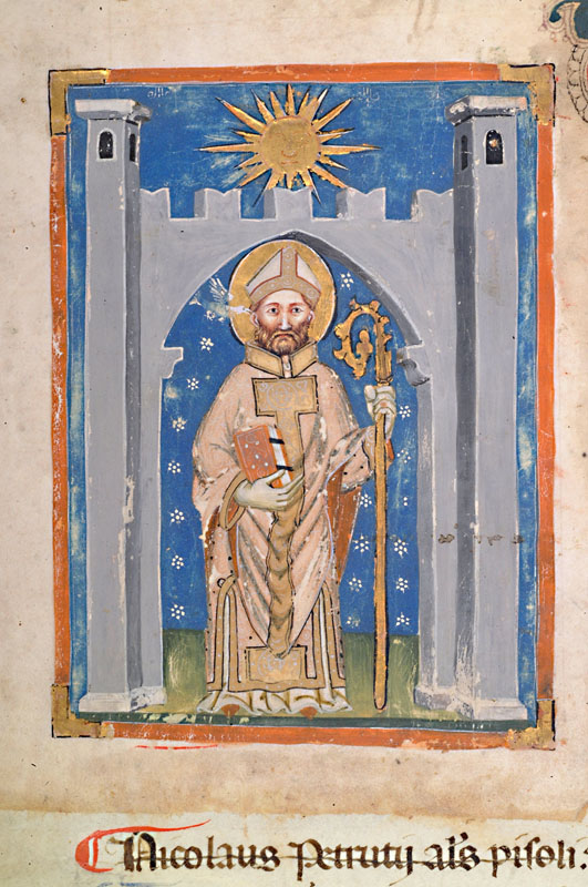 Tratto dal manoscritto 956 conservato presso la biblioteca Augusta, Perugia.